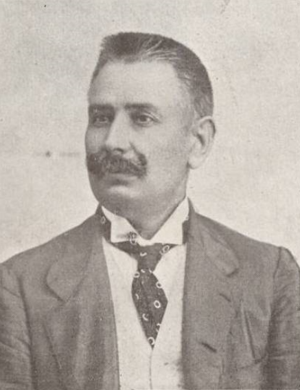 Benigno Bolaños